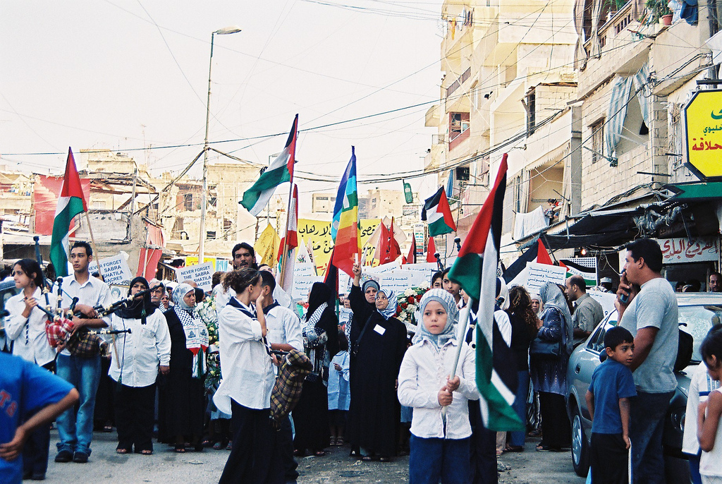 Alljährliche, quasi-obligatorische Demonstration zur Erinnerung an das Sabra and Shatila Massaker. Siehe